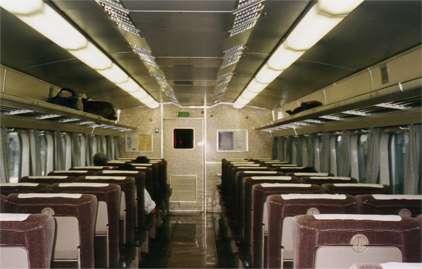 東海道0系指定席車2&2シート